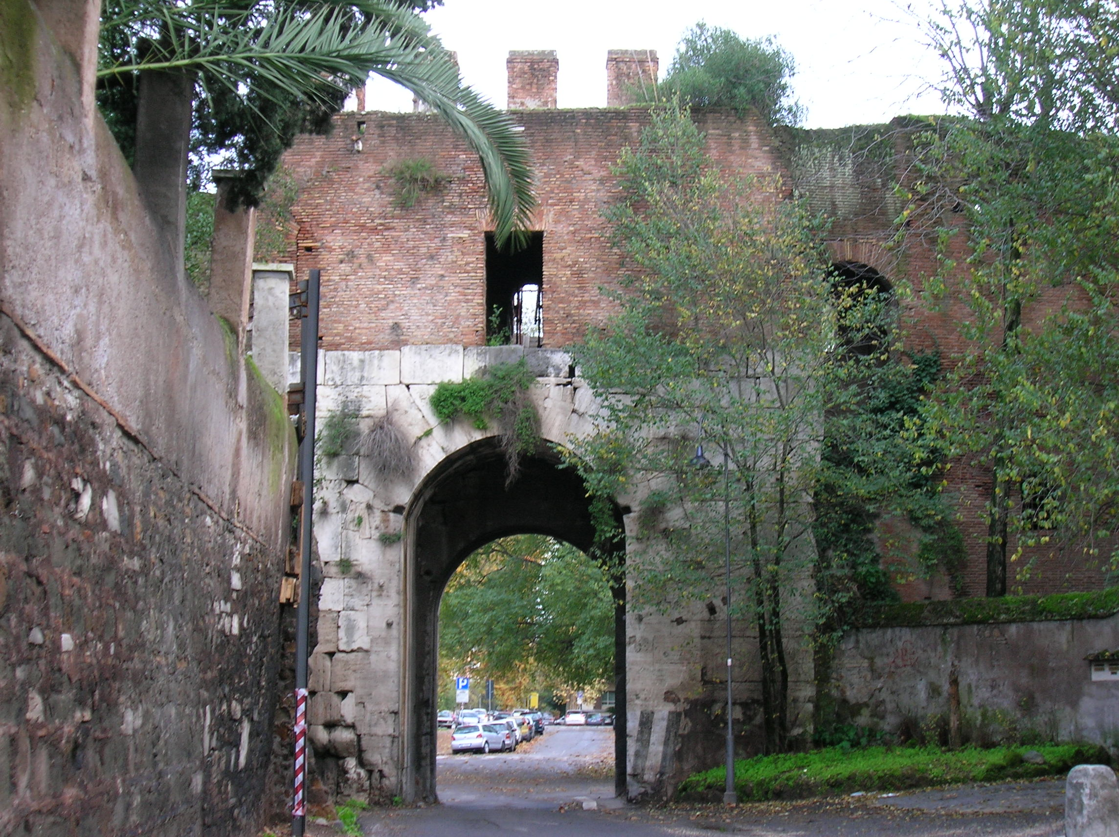 Porta Latina de Rome, face interne